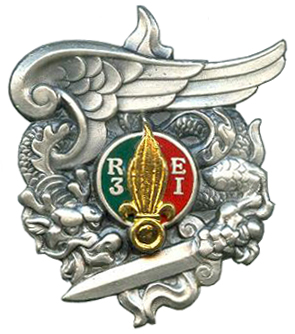 insigne de la compagnie parachutiste du 3ème REI